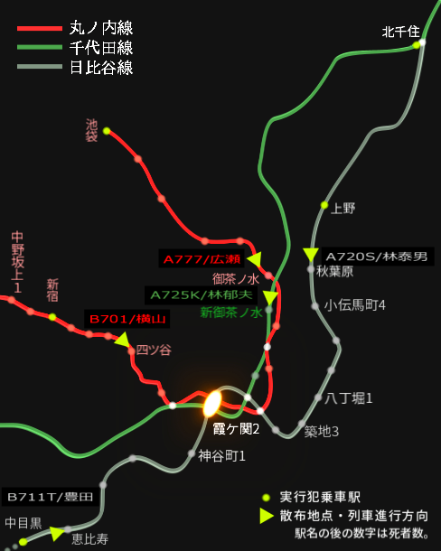 をもとに作成